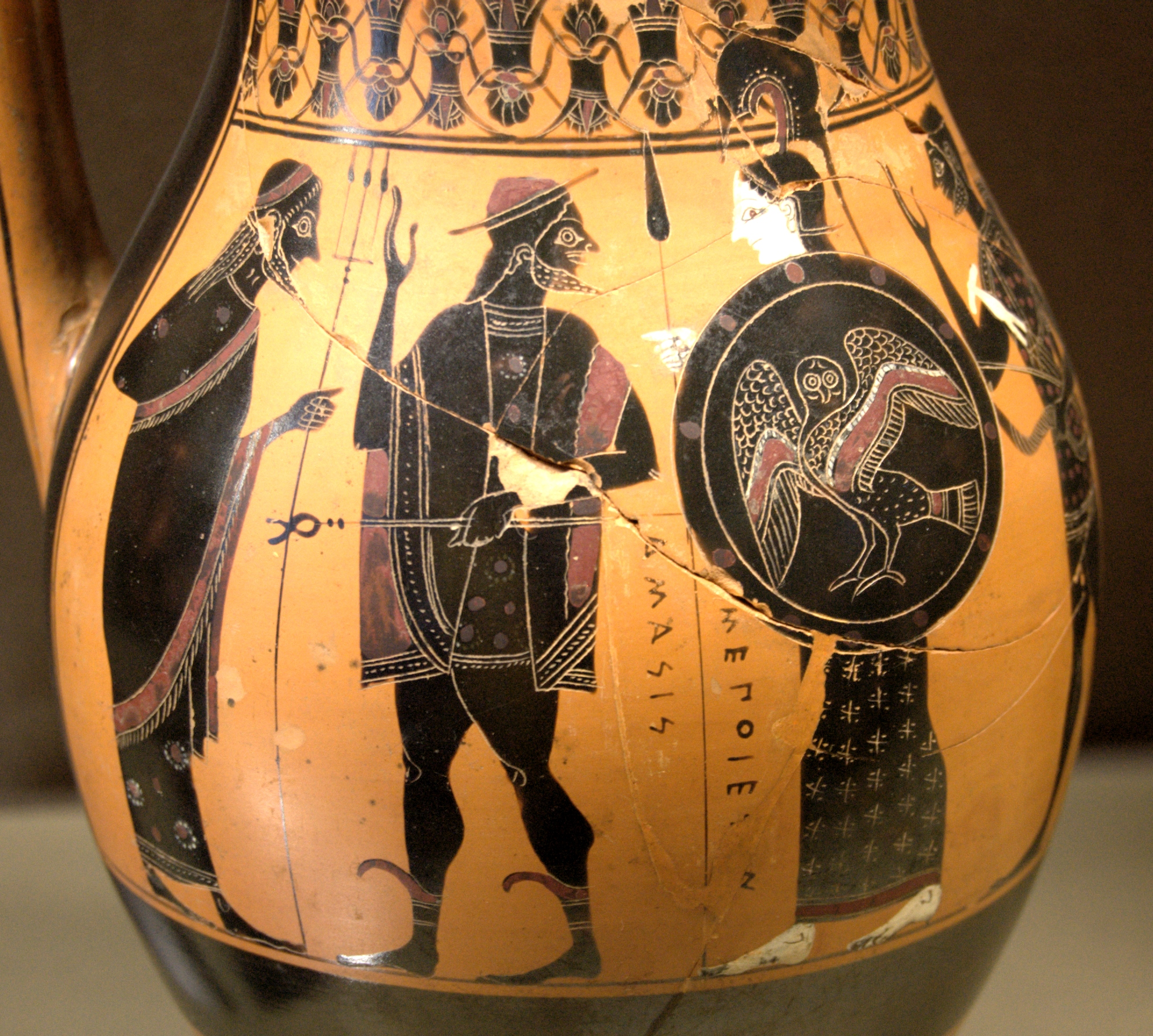 Herakles entering Olympus.